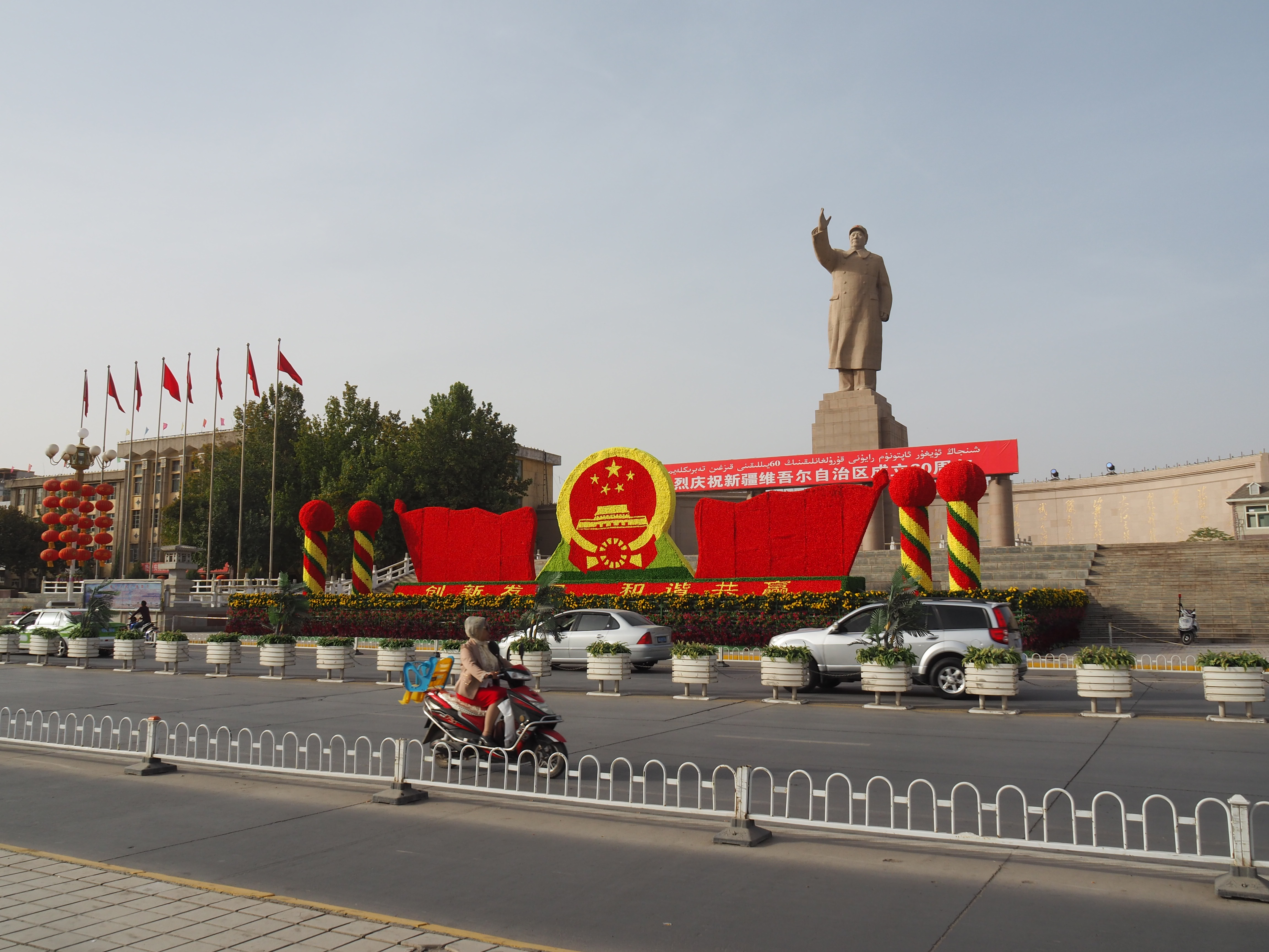 Kashgar